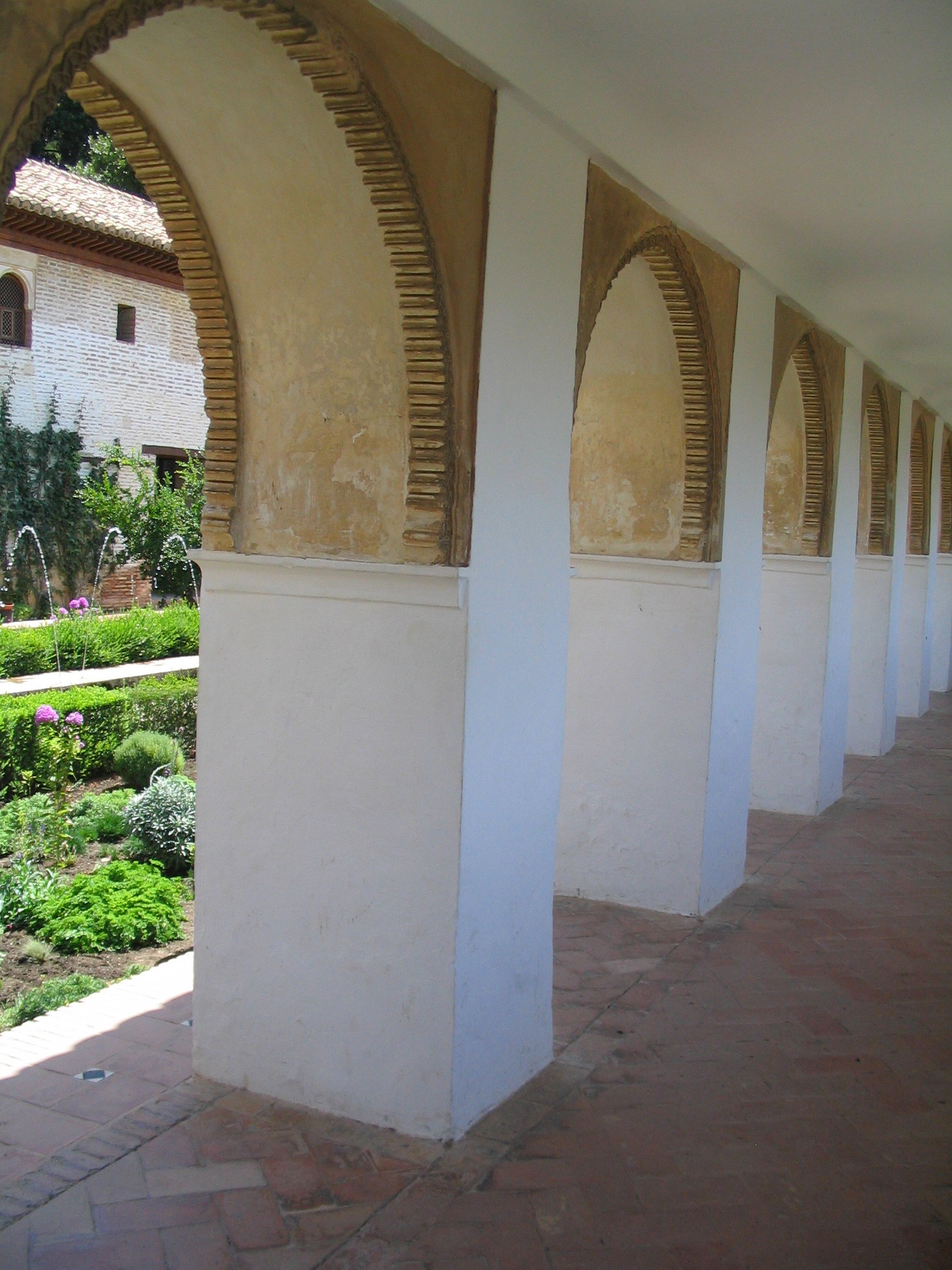 Galerie d’ombre, Palais du Generalife, Alhambra de Grenade Espagne